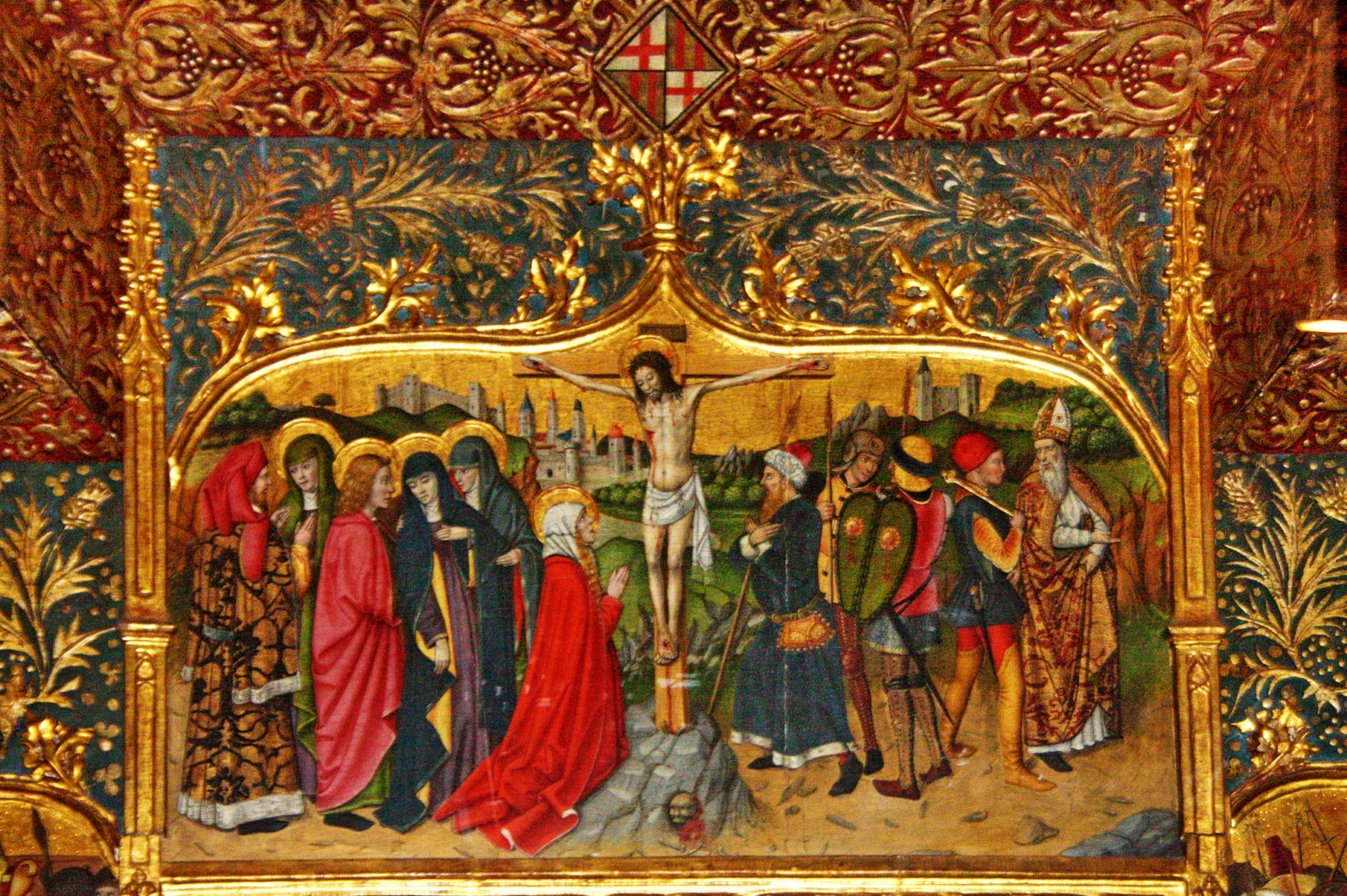 Representa els sants Abdó i Senén i la pradel.la és dedicada als sants metges Cosme i Damià. És una de les poques obres que es poden atribuir amb tota certesa a Jaume Huguet, ja que se'n conserva el contracte de l'any 1460. Huguet és l´únic representant català de la tendència flamenca, que domina el període final del gòtic. A la taula central hi són representants els sants titulars, Abdó i Senén, prínceps de Pèrsia que van ser capturats i morts a Roma. Per causes desconegudes, sembla que les relíquies d'aquests sants van ser traslladades a Arlés del Tec (Vallespir) i d'aquí la rao que gaudissin d'un culte ben arrelat a Catalunya, invocats com a patrons de la pagesia i coneguts com Sant Nin i Sant Non. Composen el reatule un Calvari i quatre escenes relatives als sants. A la pradel.la es descriuen escenes del matitiri i la mort dels sants Cosme i Damià, metges amb un possible origen àrab i, com els anteriors, també molt venerats a Catalunya. Al guardapols, decoracions de tipus vegetals i les armes de Terrassa i Barcelona. Actualment es troba a l'Església de Sant Pere de Terrassa.